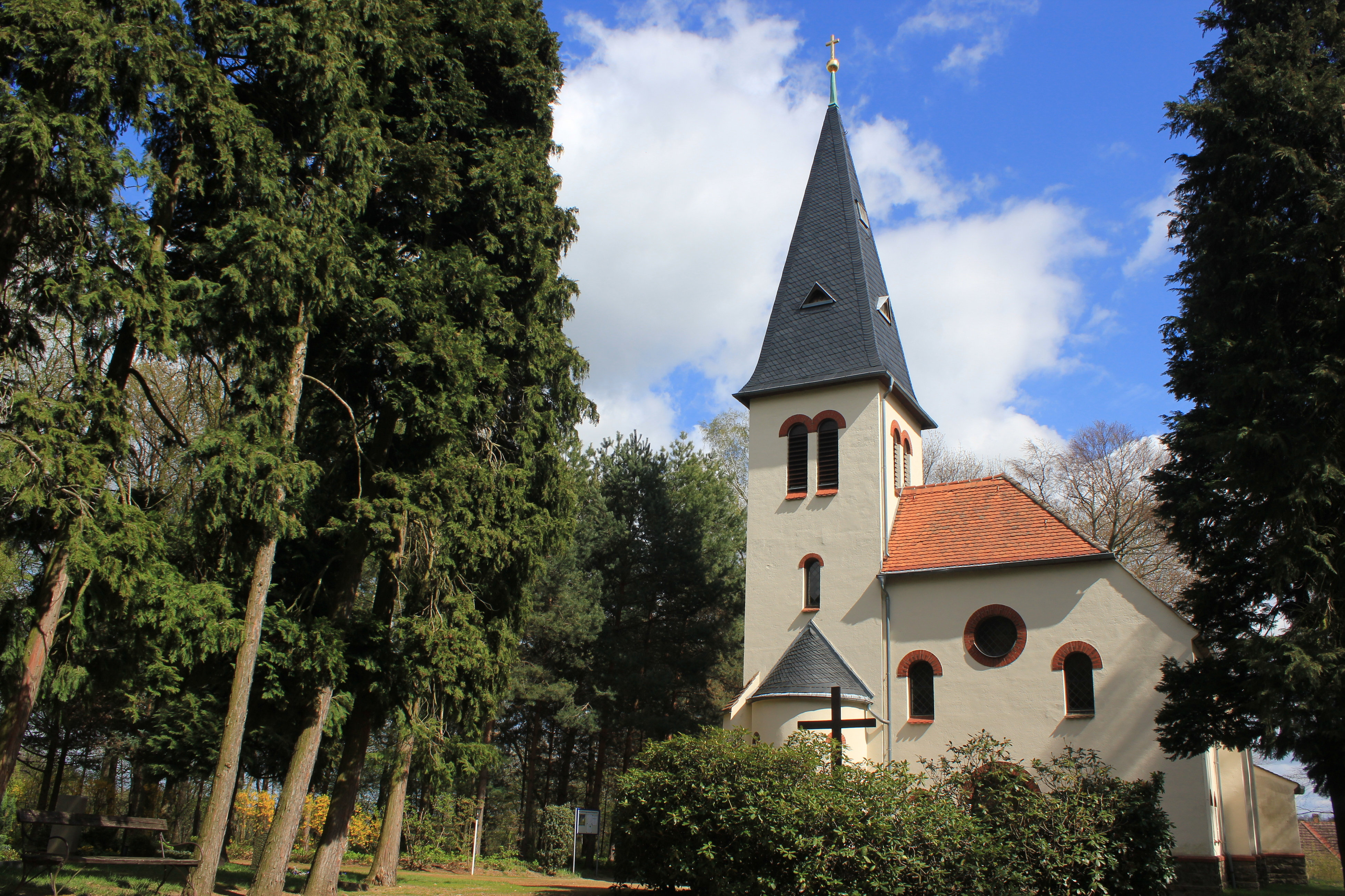 Hornjoserbsce: Ewangelska cyrkej w Smječkecach.